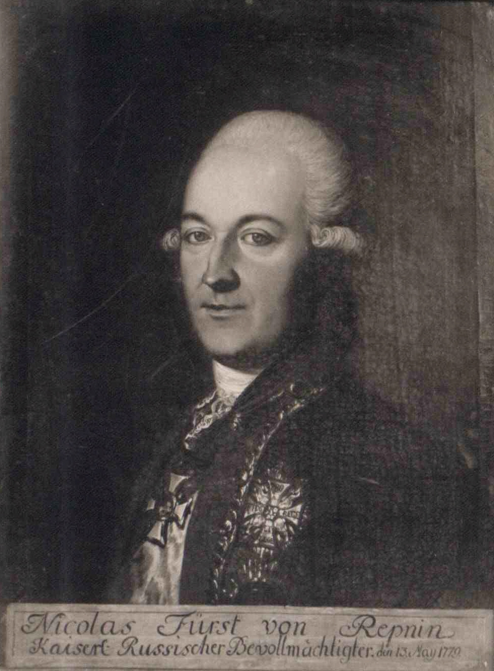 Nicolas Fürst von Repnin, Kaiserl. Russ. Bevollmächtigter, den 13. May 1779 Wien, Österreichische Nationalbibliothek, Bildarchiv und Grafiksammlung, Inventar-Nr. PORT_00102163_01